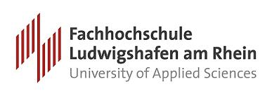 Logo der Fachhochschule Ludwigshafen